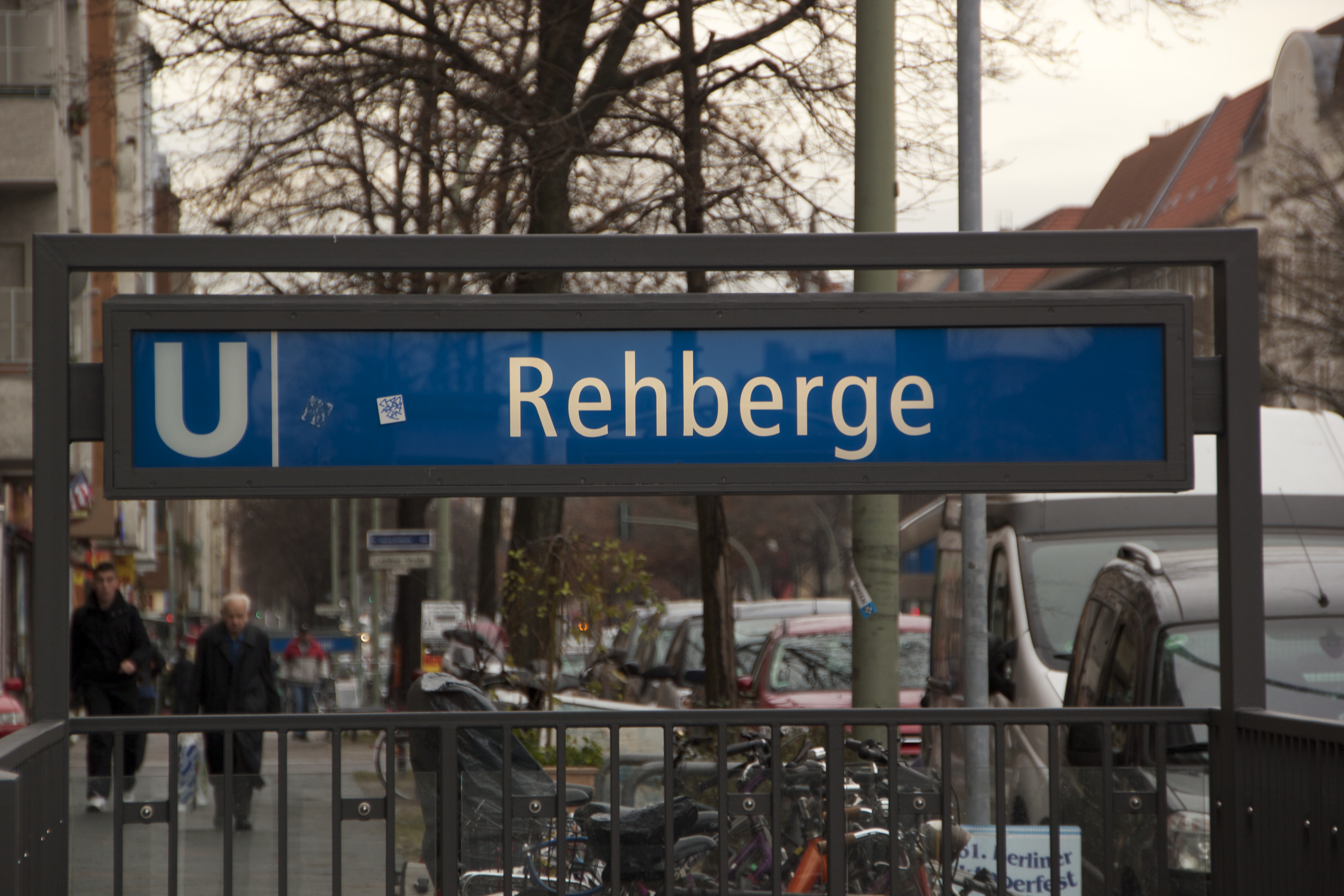 Neuer Eingangsbereich